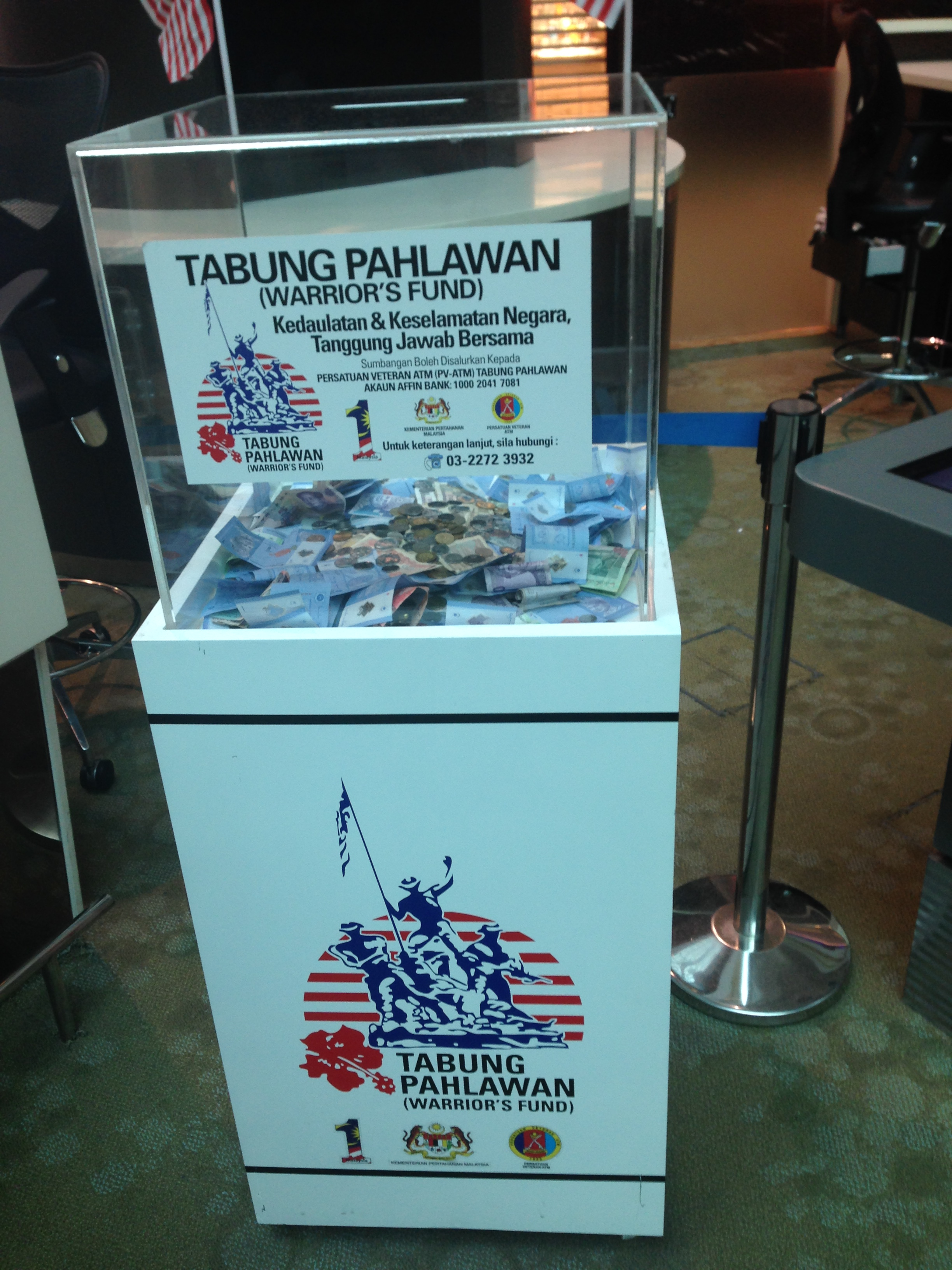 吉隆坡國際機場的捐獻箱。